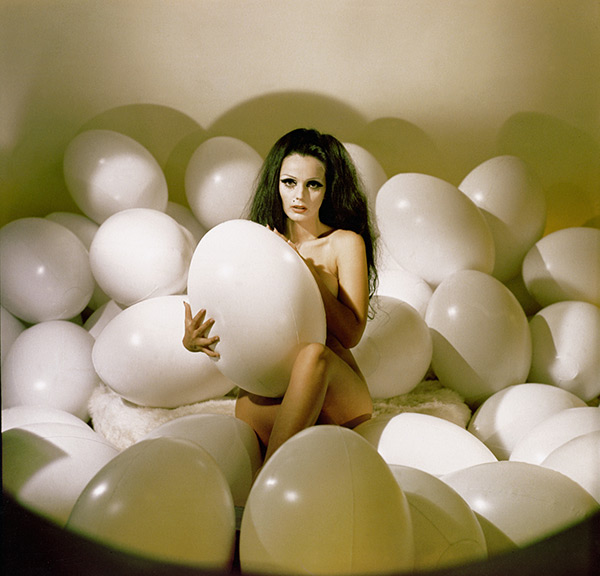 Marcela López Rey en el set de Los neuróticos (1971). Escenografía realizada por Edgardo Giménez.